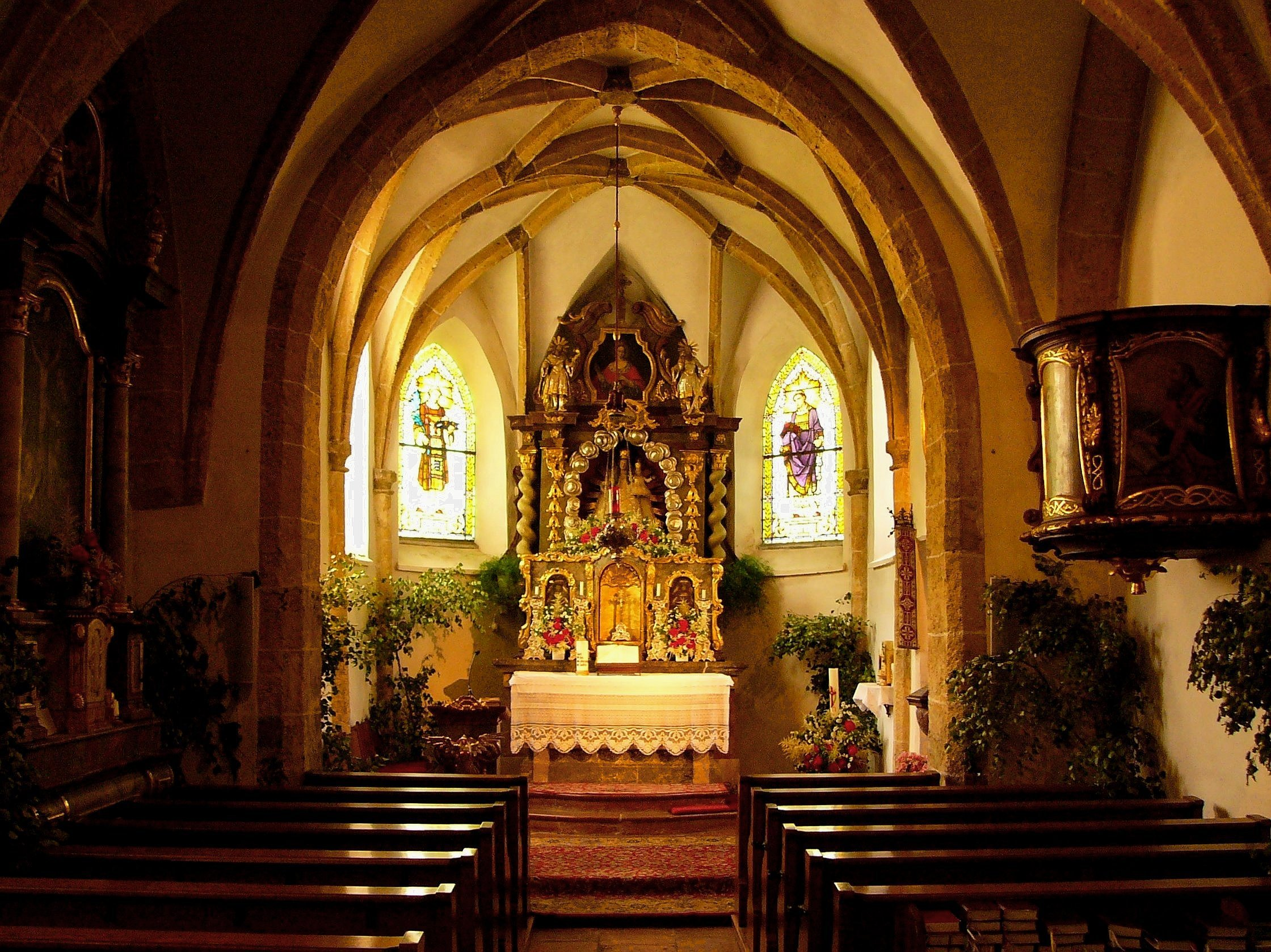 Kath. Pfarrkirche hl. Radegund und Friedhof